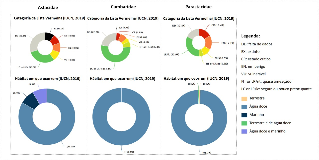 Gráficos de espécies ameaçadas de Astacidea